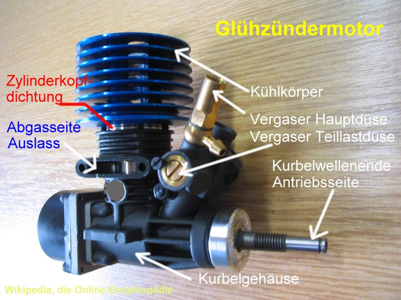 Glühzündermotor